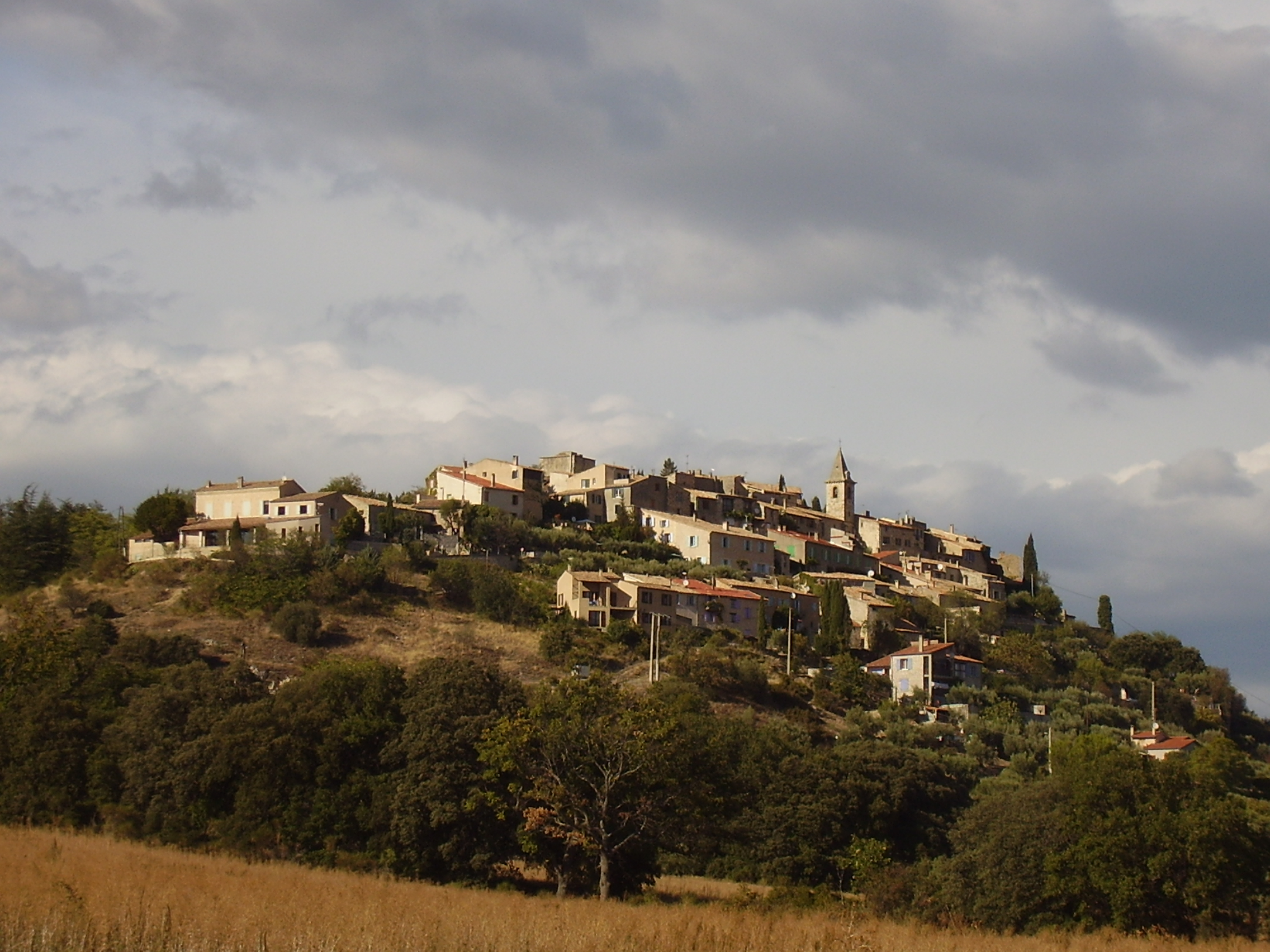 Montfort (Alpes-de-Haute-Provence)